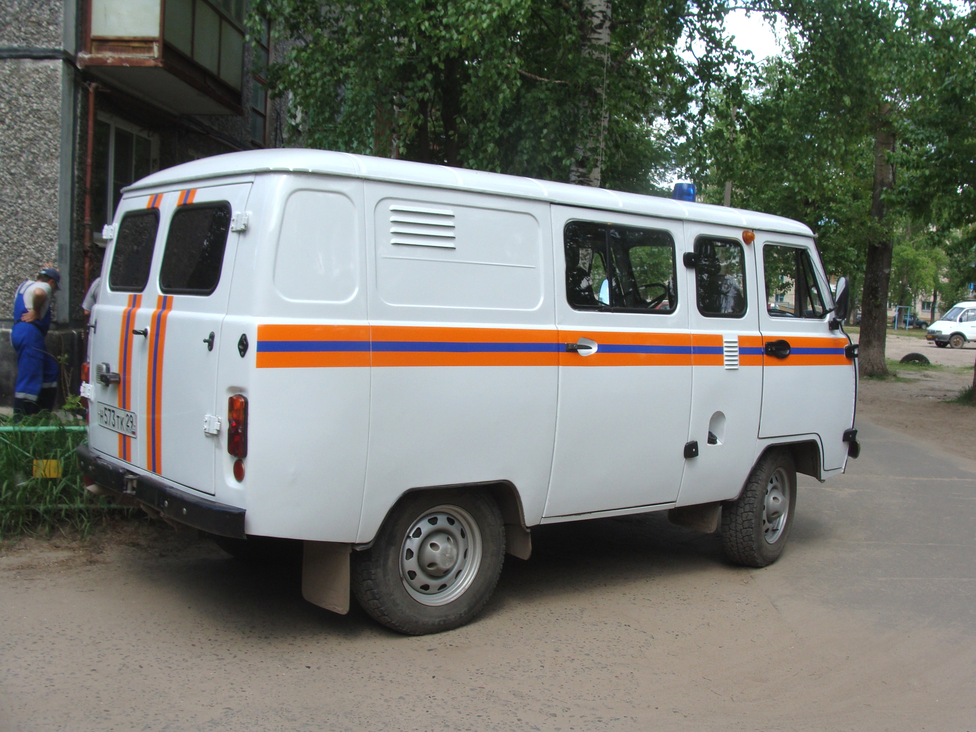 УАЗ 452 газоспасателей КотласГазСервис, Коряжма